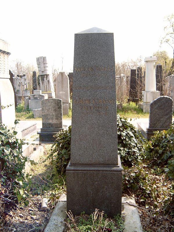 Kóbor Tamás (Pozsony, 1867. augusztus 28. – Budapest, 1942. május 26.) író, publicista sírja Budapesten. Kozma utcai izraelita temető: 5B-10-5